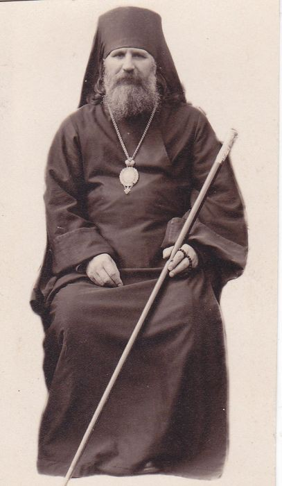 Владыка Иоанн (Поммер)